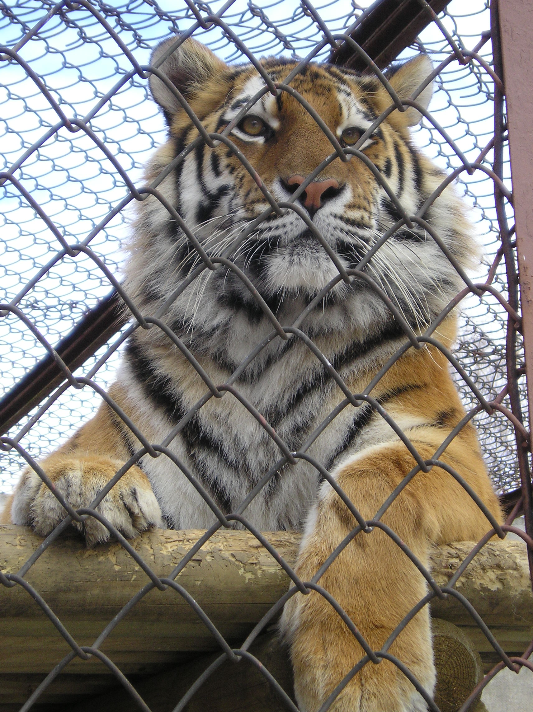 Amuuri tiiger